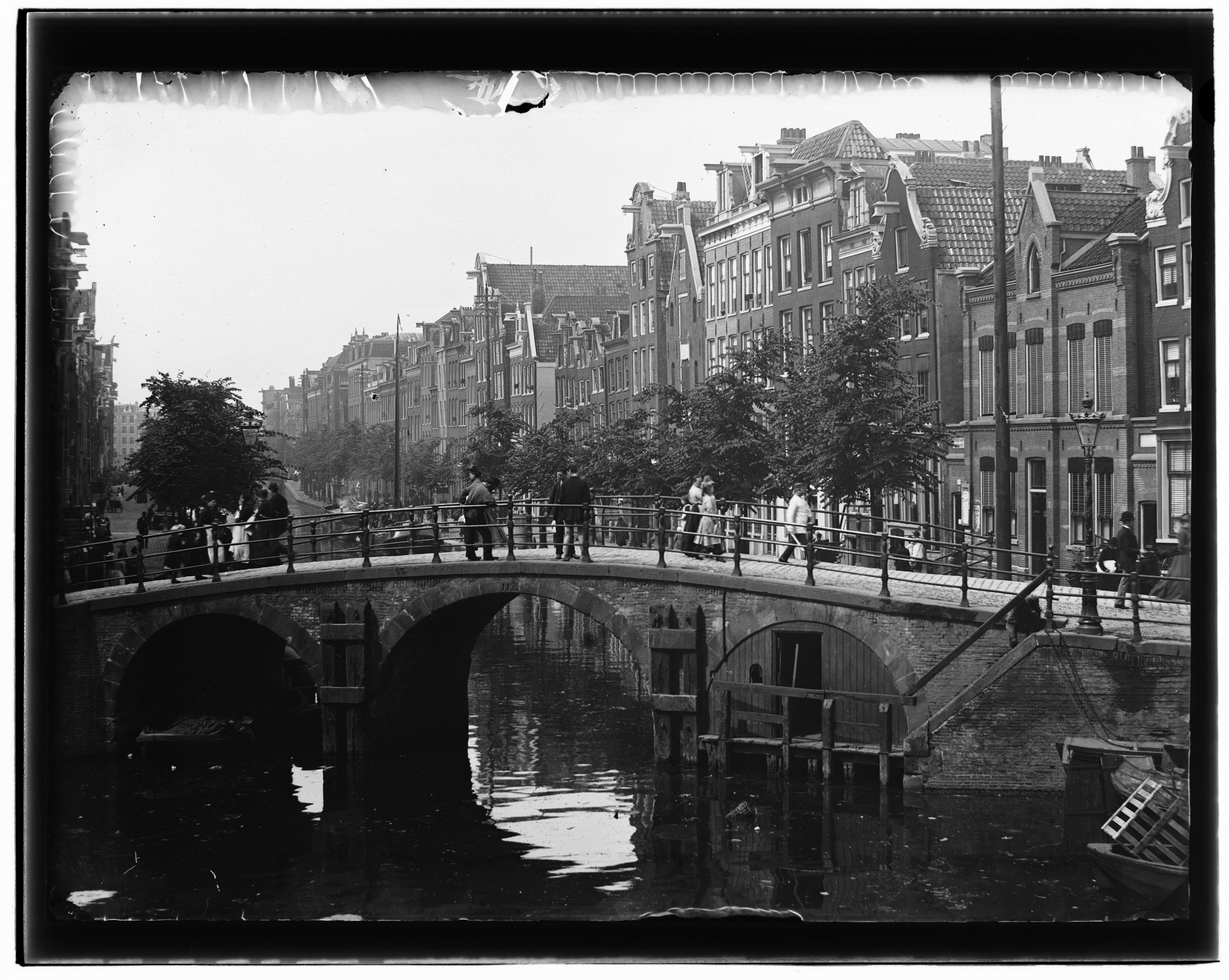 Beschrijving Lauriergracht 2-4-6 enz. (v.r.n.l.) Brug nr.112 voor Prinsengracht Documenttype foto Vervaardiger Olie``, Jacob (1834-1905) Collectie Collectie Jacob Olie Jbz. Datering 1891 Geografische naam Lauriergracht Inventarissen Afbeeldingsbestand 10019A000618 Generated with Dememorixer